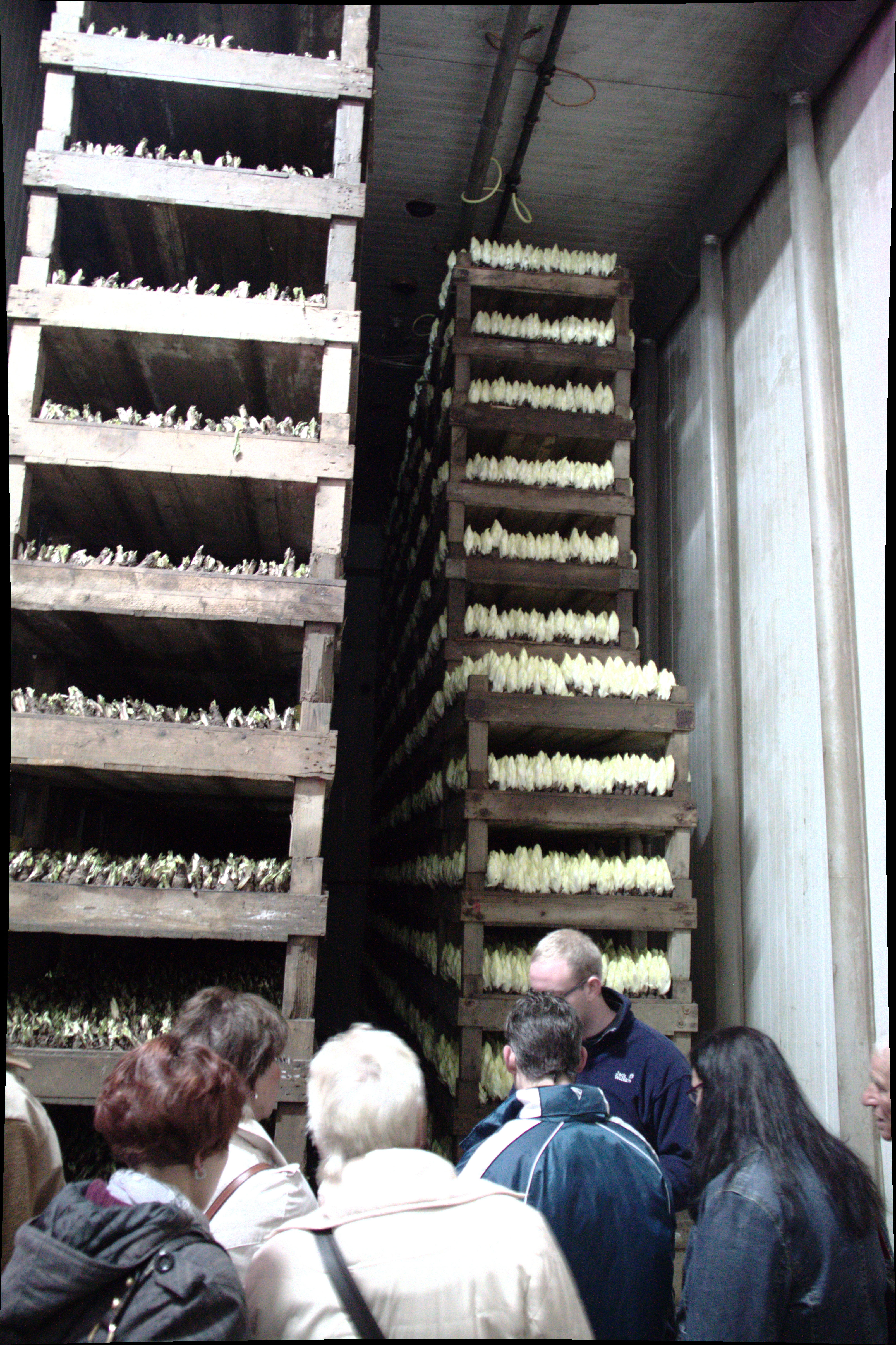 Chicorée Fabrik in Gelsdorf (am Tag der offenen Höfe) - aufeinander gestapelte Chicorée-Paletten im Dunkelraum (hier zur Besichtigung beleuchtet)